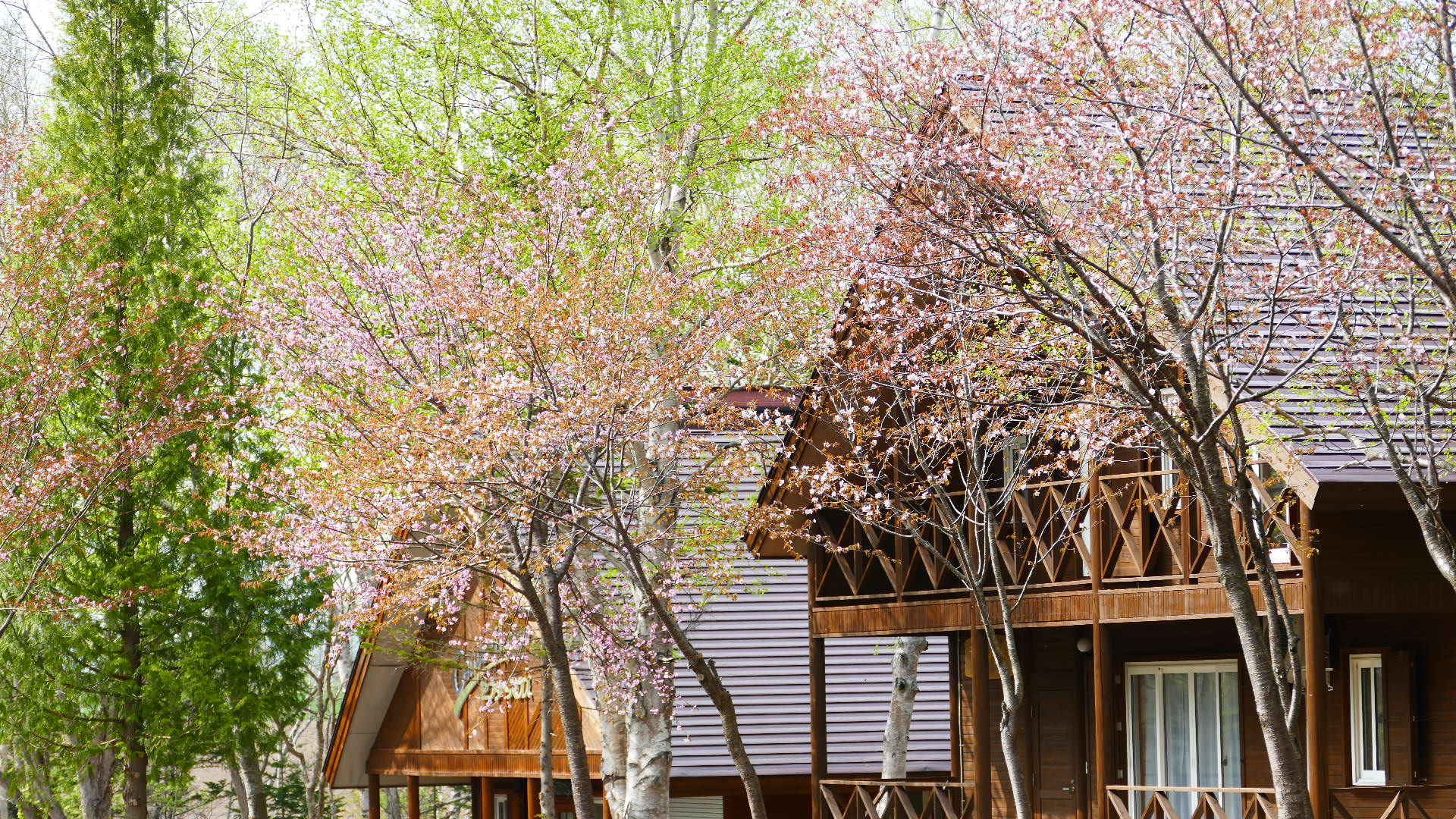 歌登地区にある、うたのぼりグリーンパークの裏手に位置するコテージの里 Panasonic Lumix DMC-FZ1000